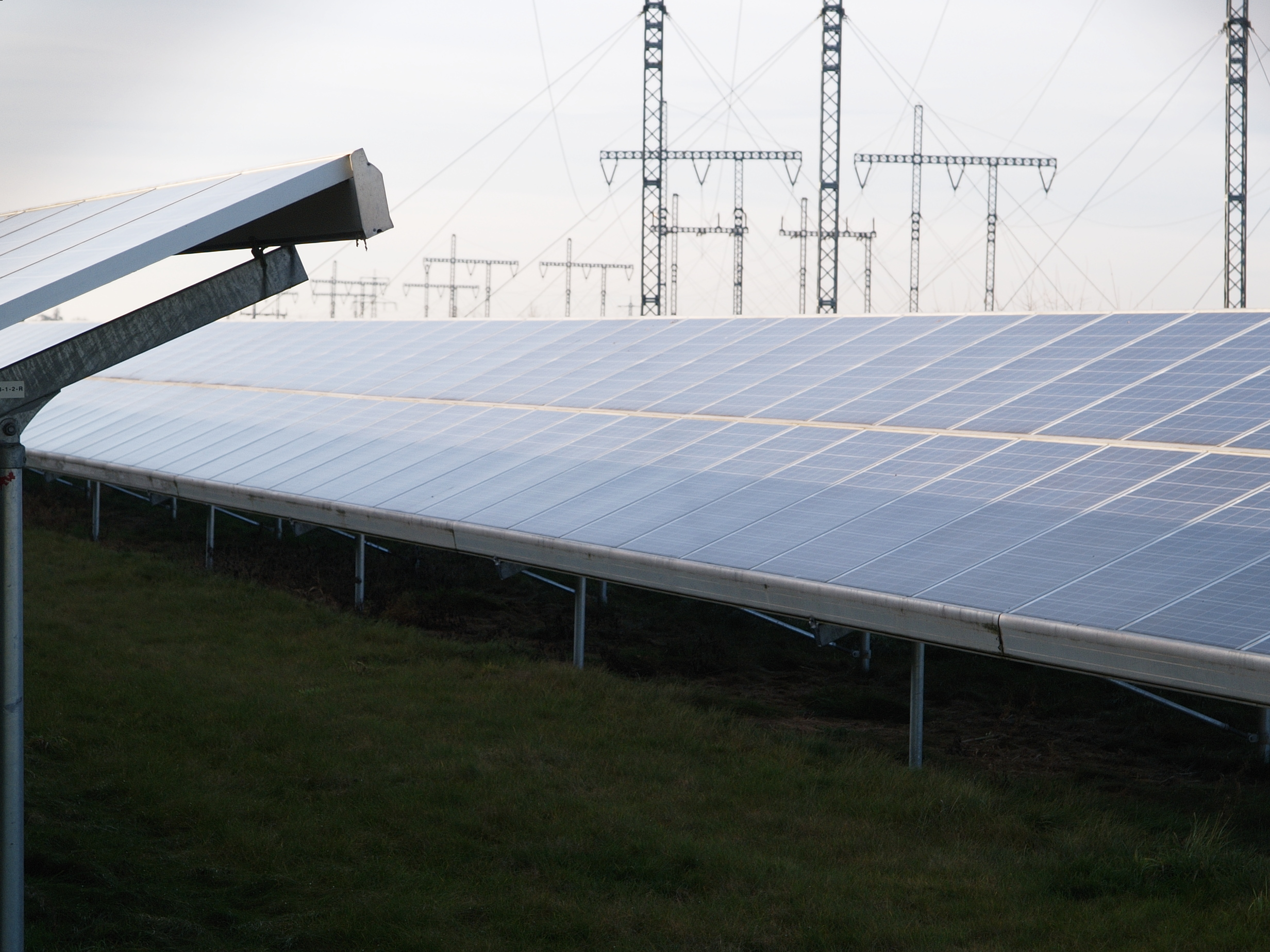 Schattenwurf im Solarfeld Gänsdorf an einem Nachmittag Ende Dezember auf die dahinterstehende Modulreihe; dahinter Mastprovisorien (110-kV-Leitung)